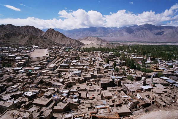 La ciutat de Leh (Ladakh, Índia)